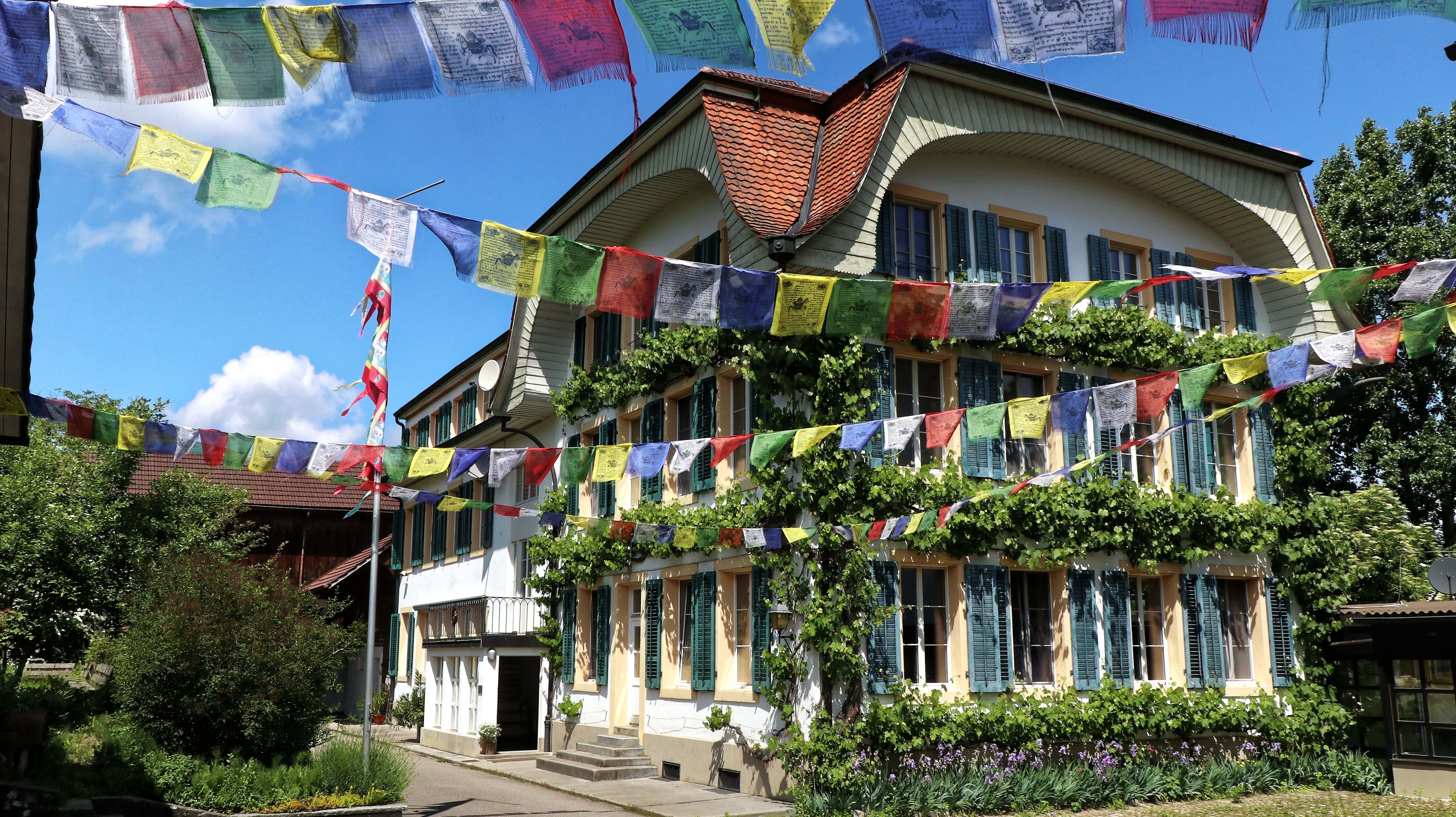 Landguet Ried, Bilder vom Seminarzentrum und Umgebung